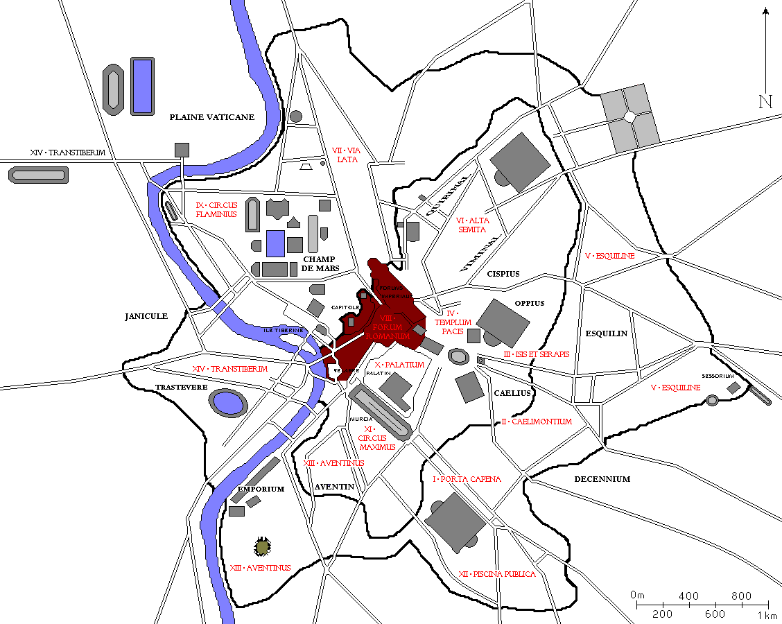 Plan de Rome avec la huitième région des 14 régions d'Auguste